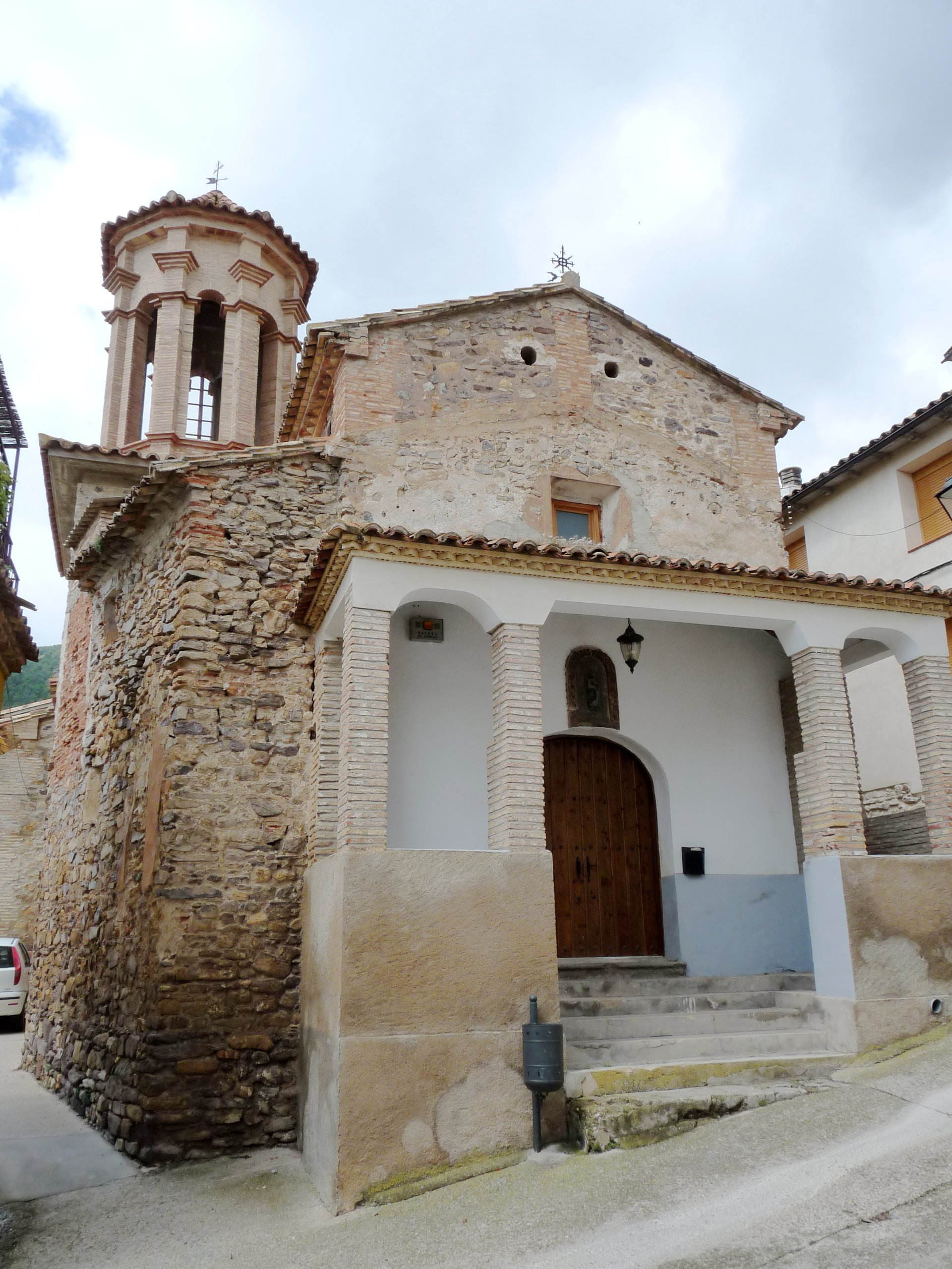 Talamantes - Iglesia de San Pedro Apóstol s. XVI - Fachada